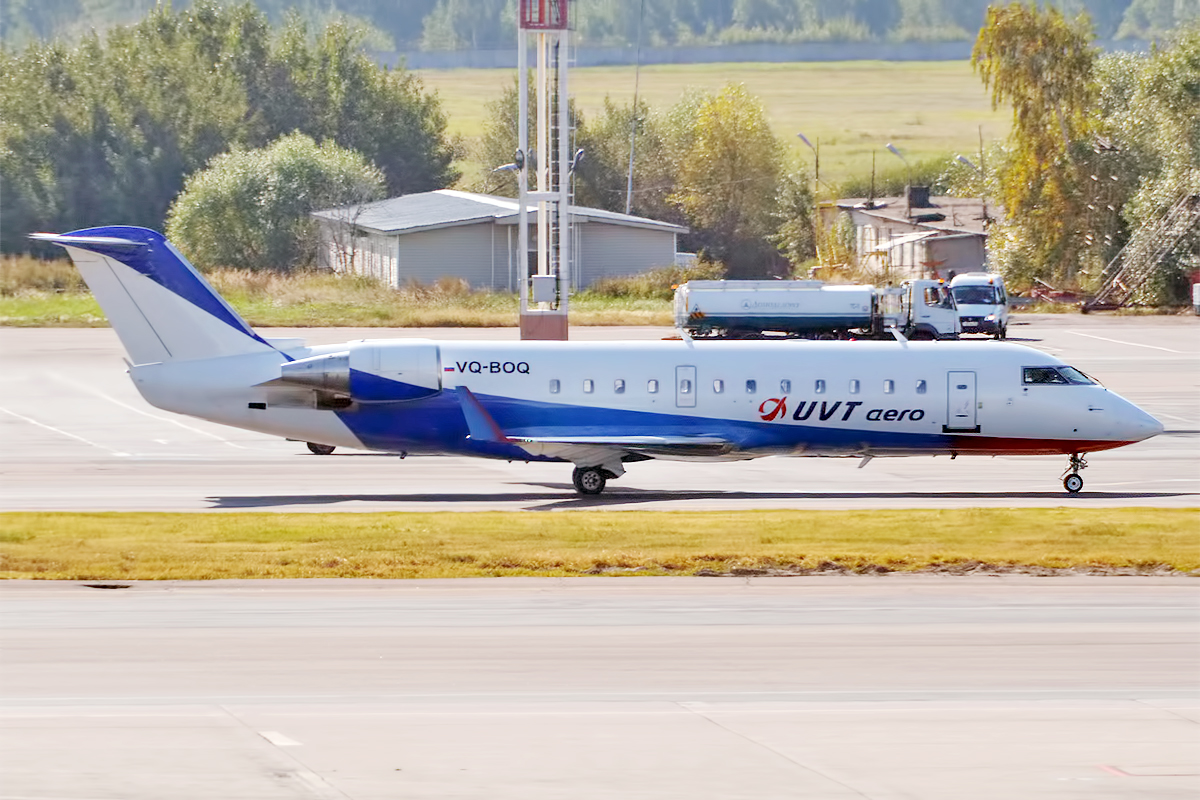 UVT Aero, VQ-BOQ, Canadair CRJ-100 at Domodedovo International Airport